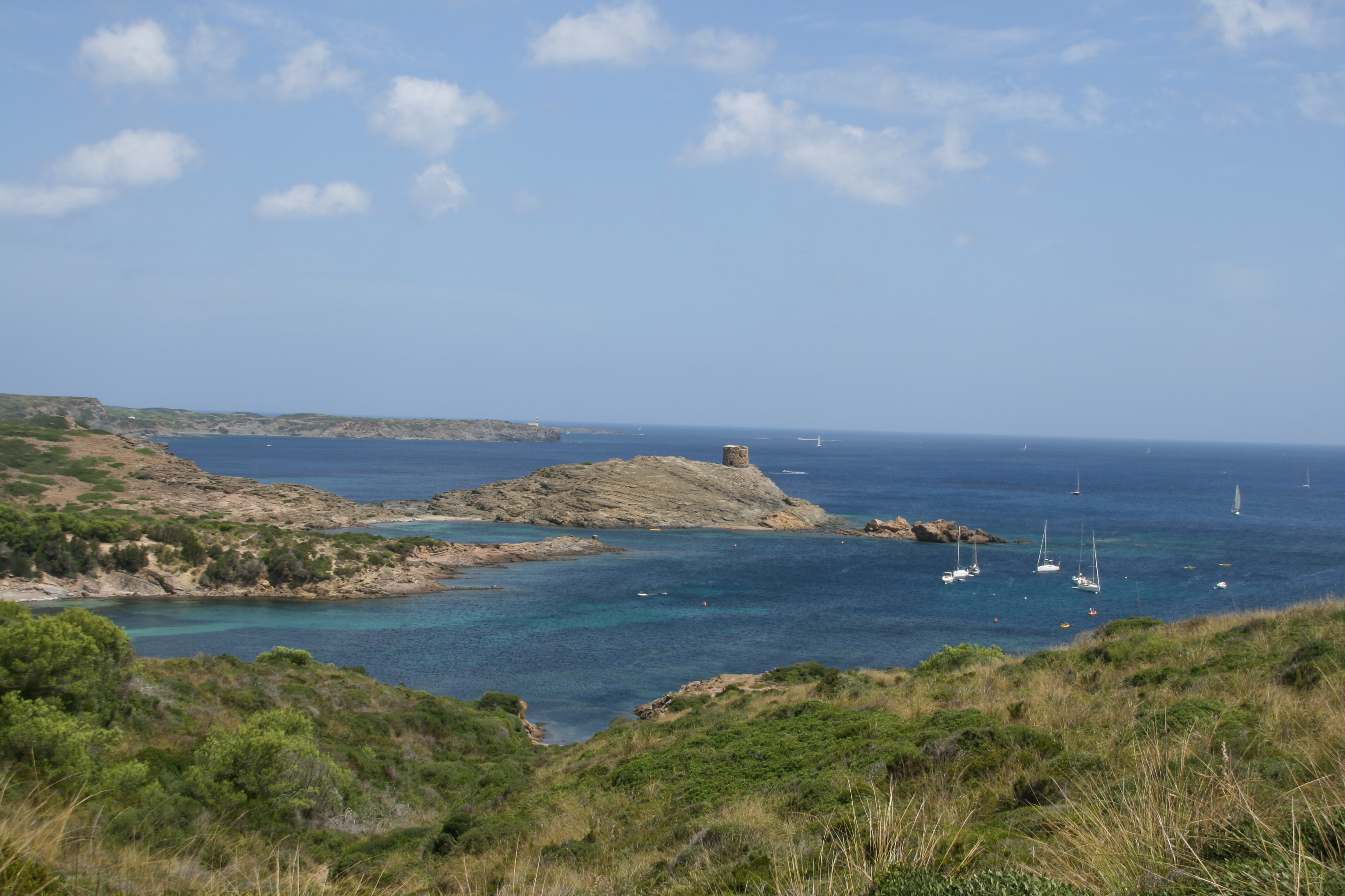 Torre de Rambla al otro lado de la cala des Tamarells